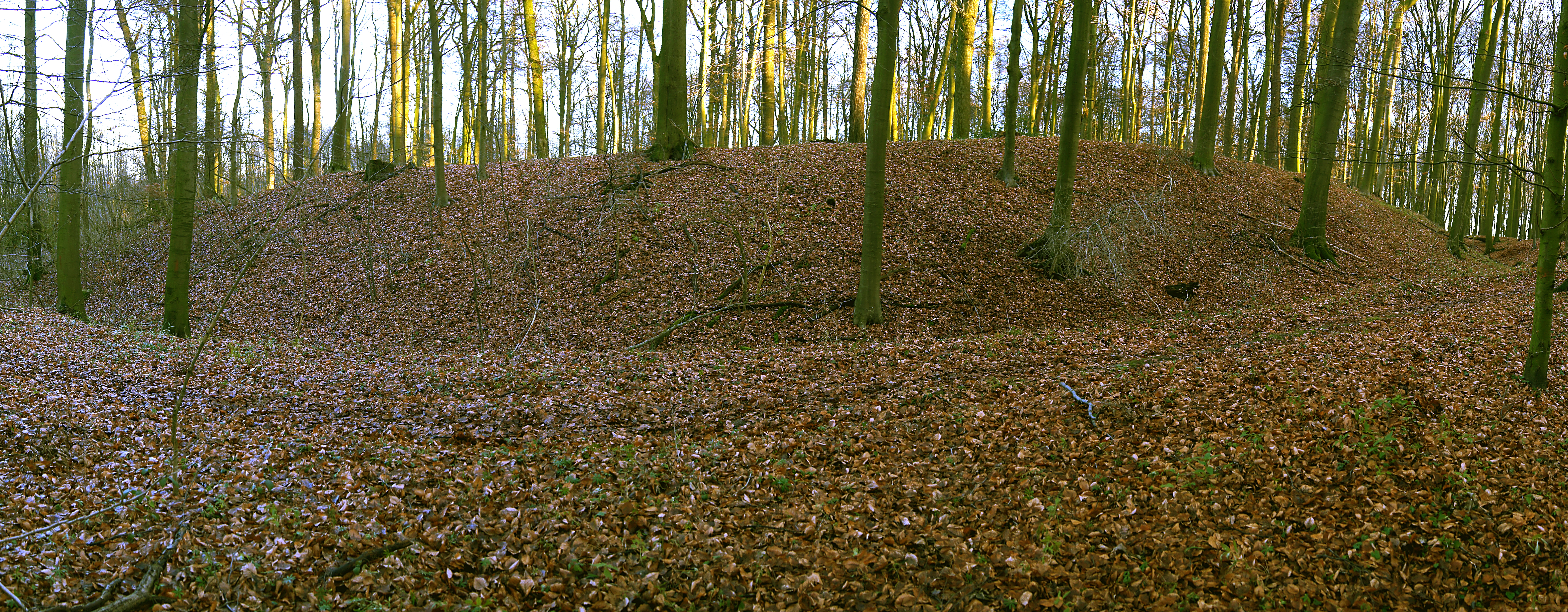 Die Oldenborg in einem Wäldchen westlich von Laer ist eine aufgelassene mittelalterliche Wallburg im Münsterland. Sie ist eine der größten ihrer Art in Nordwest-Deutschland. Ihre Geschichte liegt weitgehend im Dunkeln. Vermutlich im 5.Jahrhundert gegründet, wurde sie mehrfach erweitert und um die Mitte des 11. Jahrhunderts wieder aufgegeben. Keramikfunde deuten auf eine größere Besiedlung in karolingischer Zeit hin. Das Foto zeigt den innersten Wallring, einen Rundling von fast 100 Meter im Durchmesser, der außen von einem Graben umgeben ist. Der Wall soll ursprünglich eine Höhe von rund 12 Meter gehabt haben.